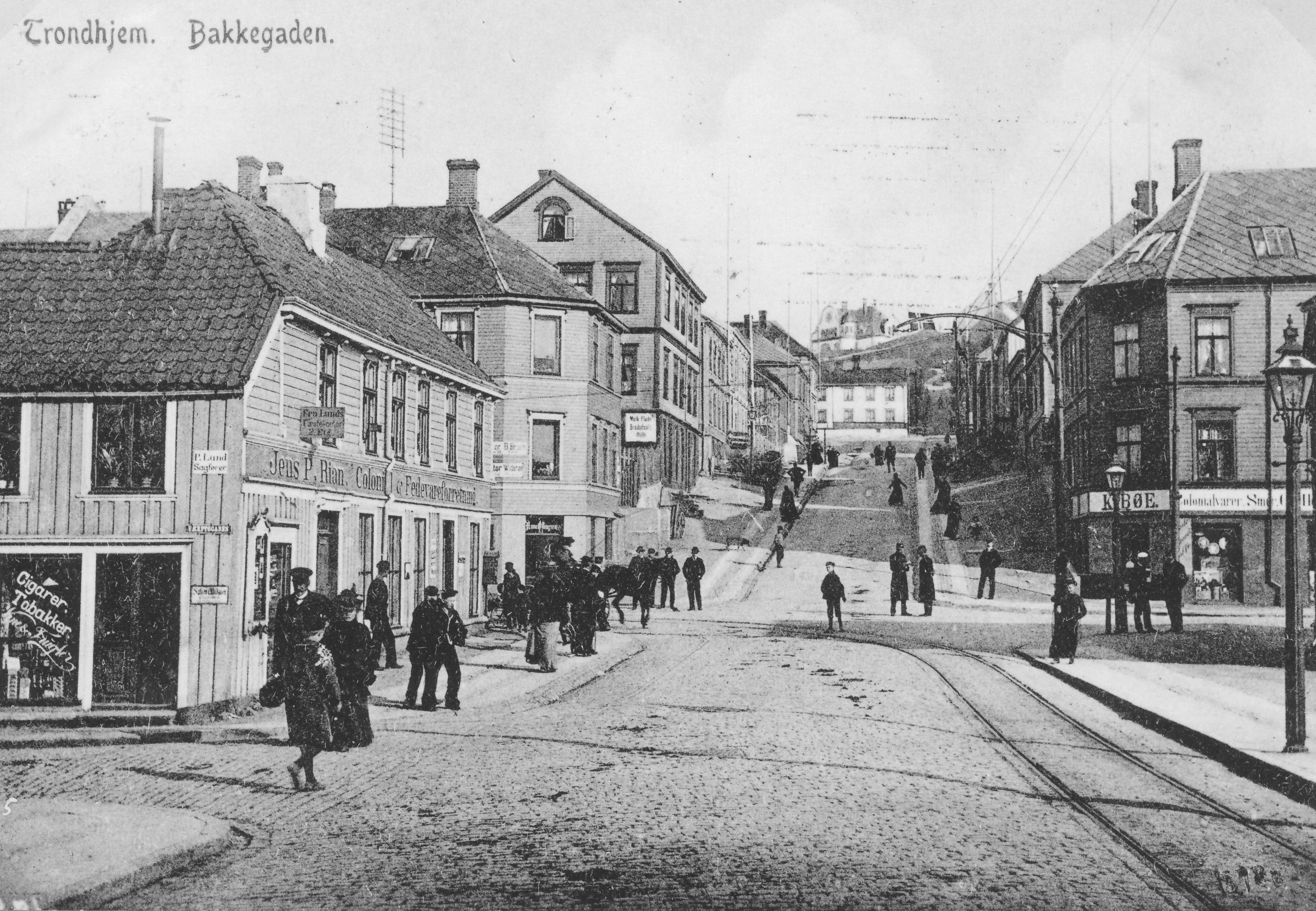 Format: Fotopositiv (Postkort) Dato / Date: 1903 Fotograf / Photographer: Ukjent Sted / Place: Bakkgata, Trondheim Eier / Owner Institution: Trondheim byarkiv, The Municipal Archives of Trondheim Arkivreferanse / Archive reference: Tor.H40.B02.F0079 [T0263] Merknad: Rianhjørnet og Bakkegata i 1903. Til v. Jens P. Rians forretningsgård som har gitt navn til hjørnet. Her ligger i dag Abrahamsengården. I bakgrunnen kneiser Kasernen over de nakne haugene.